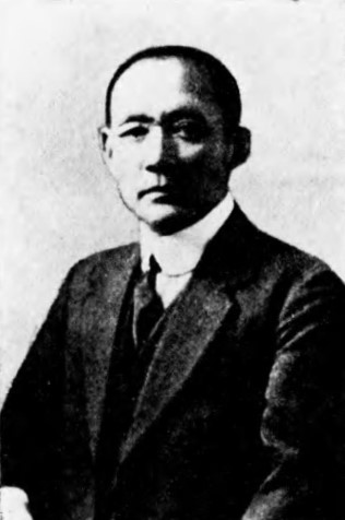 三宅川百太郎（1869～1952）